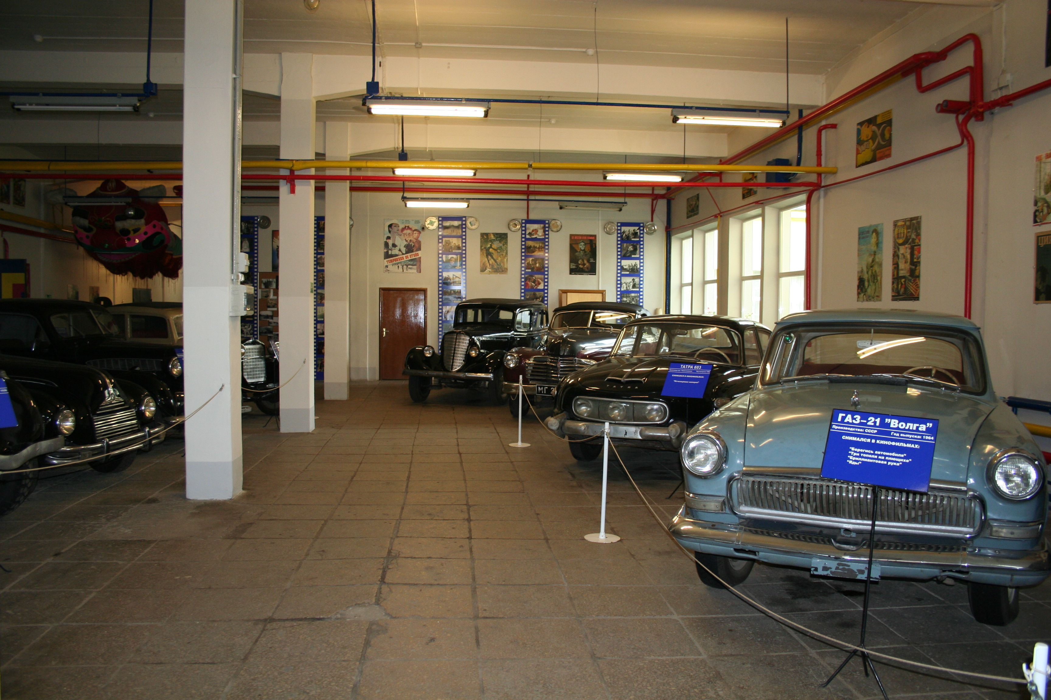 Museum auf dem Gelände des Filmstudios Mosfilm in Moskau. Die Exposition. Diverse Automobile, die in bekannten Filmstreifen wirkten.